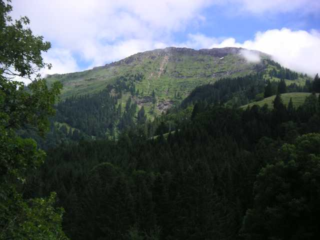 Hochgrat bei Oberstaufen Fotograf: Ulrich Adler (Benutzer:adlerulr) Datum: 2005 Andere Versionen